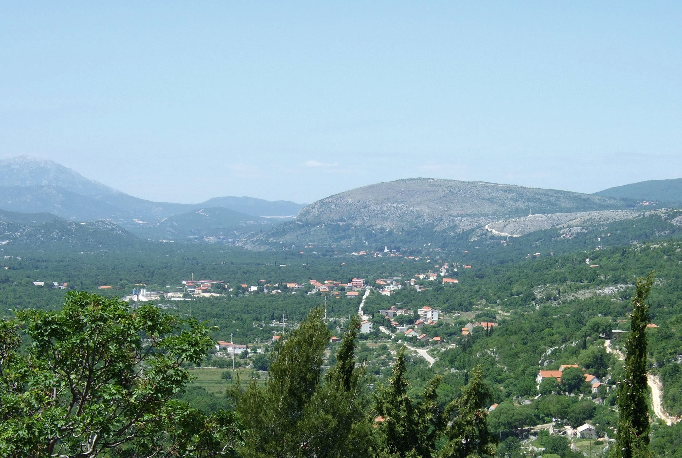 Blick von Žeževica auf Šestanovac, Katuni und Kreševo, im Hintergrund links der Mosor